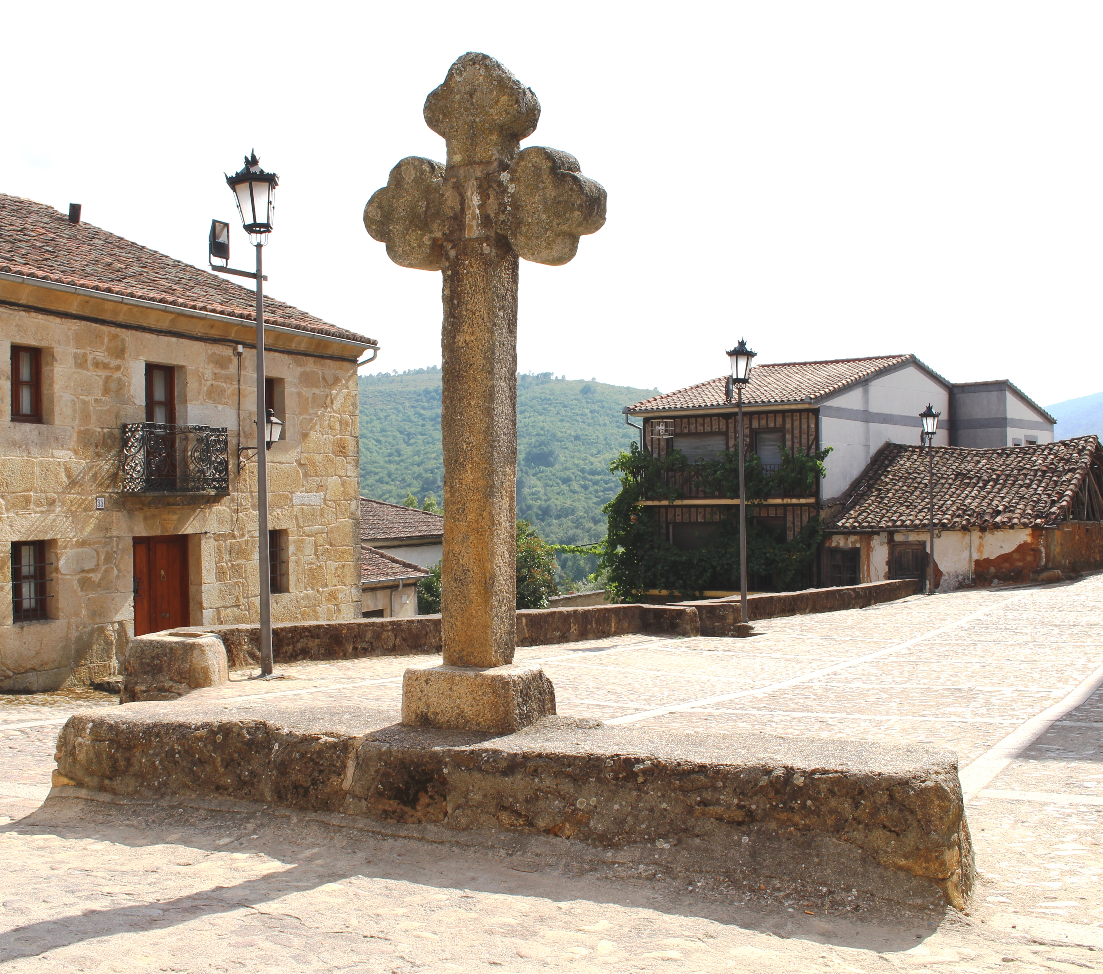 Croix de Cepeda, Salamanca